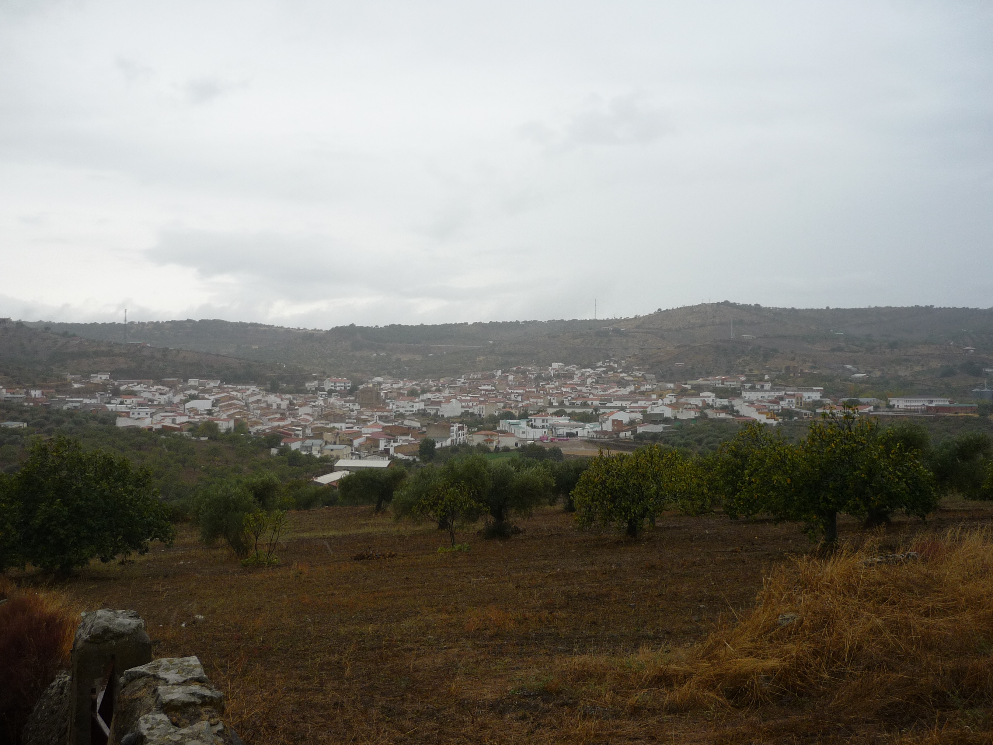 Salvaleon paisaje